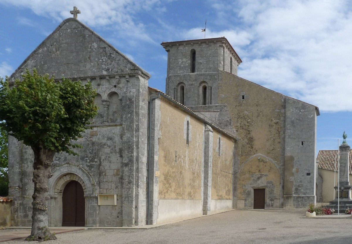 église de Semoussac, Charente-Maritime, France